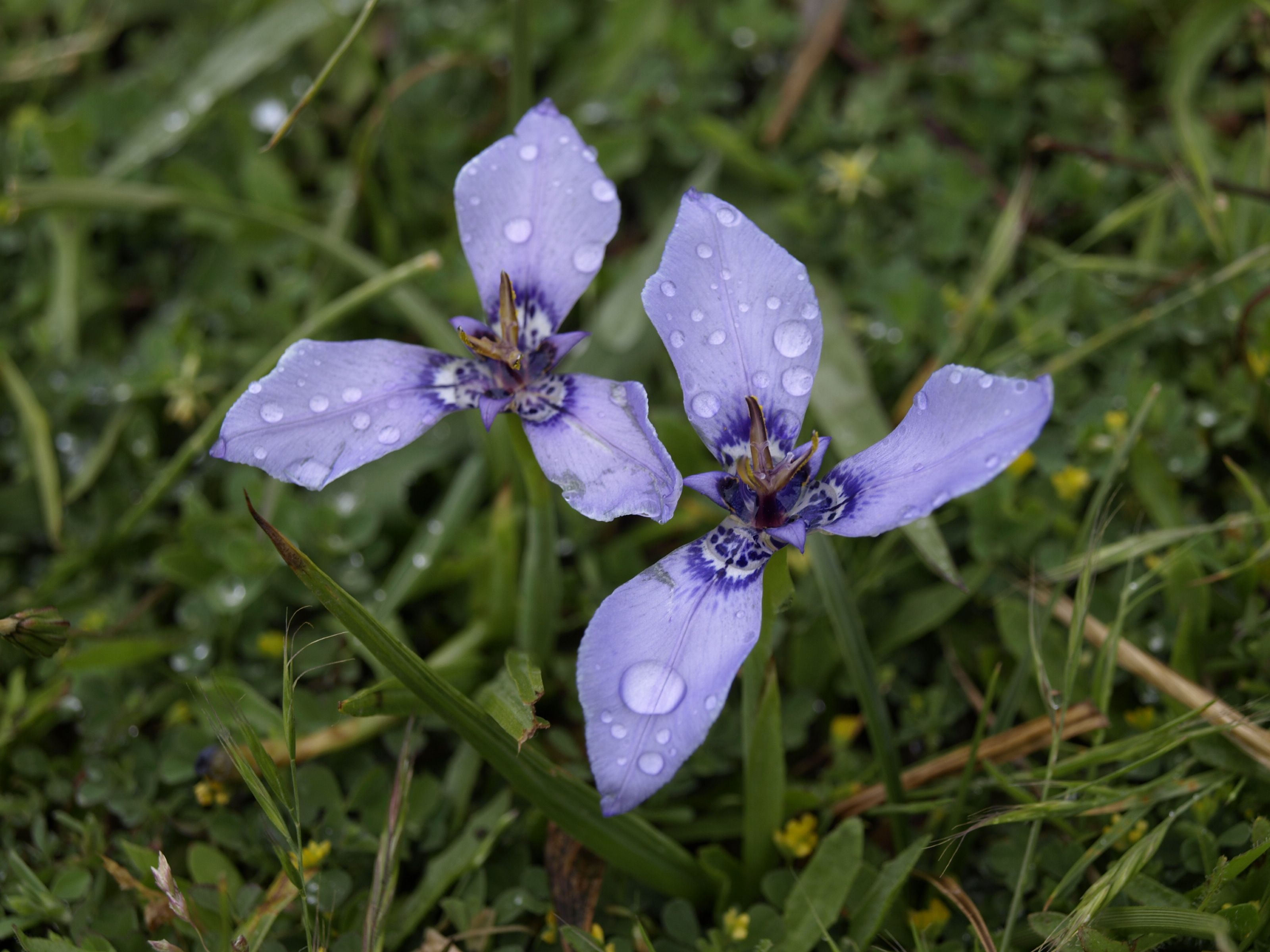 Salto de Laja, Chile.